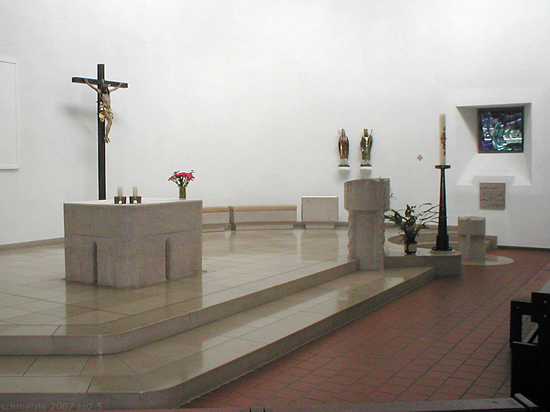 Altarbereich der Kath. Kirche St. Cornelius und Cyprian in Heilbronn-Biberach, Baden-Württemberg, Deutschland